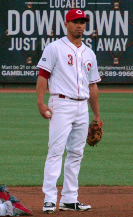 Iván DeJesús Jr.